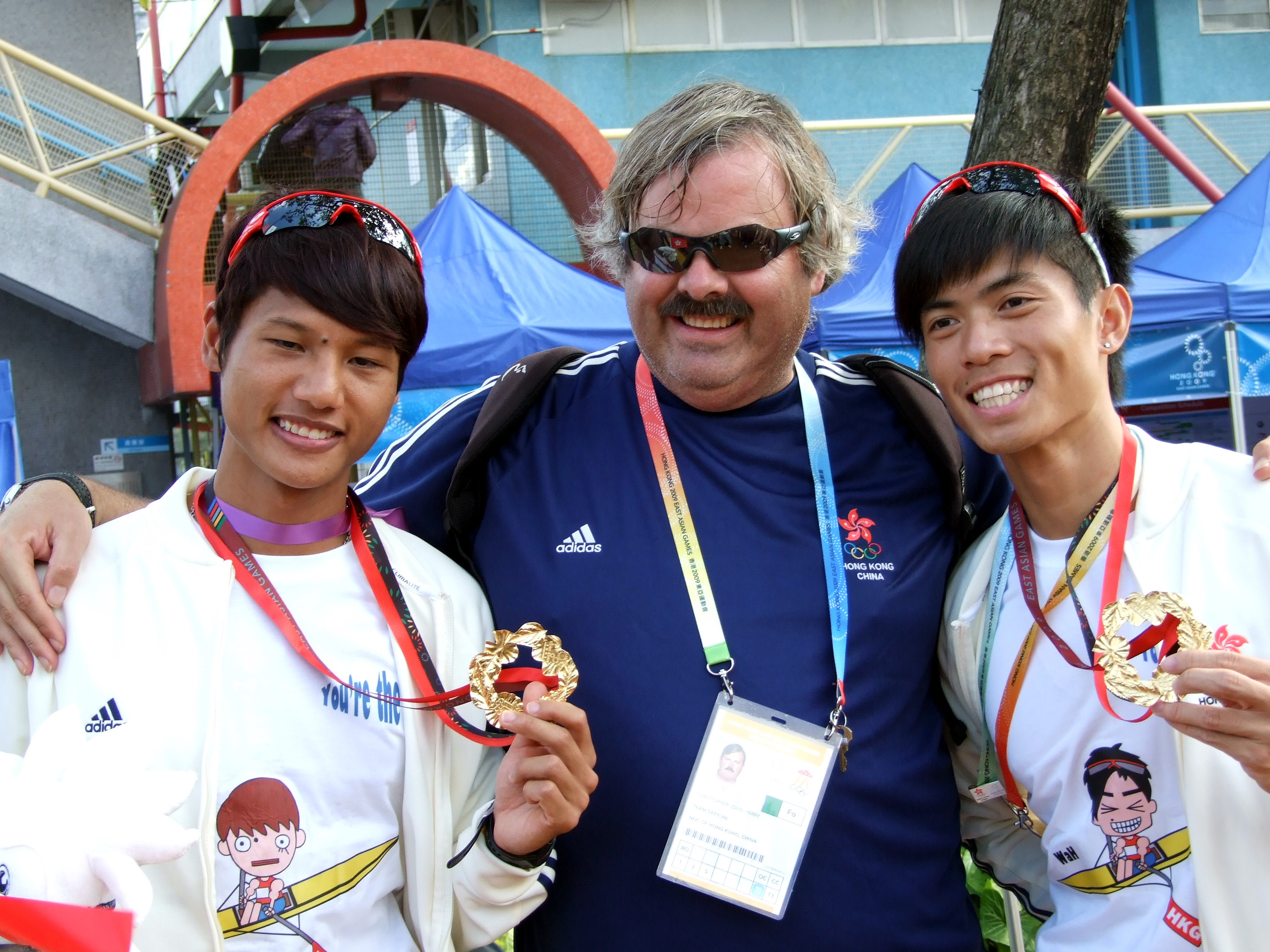 中文（香港）: 2009年東亞運動會輕量級雙人雙槳艇金牌香港隊的鄒廣榮、蘇秀華與教練白勵